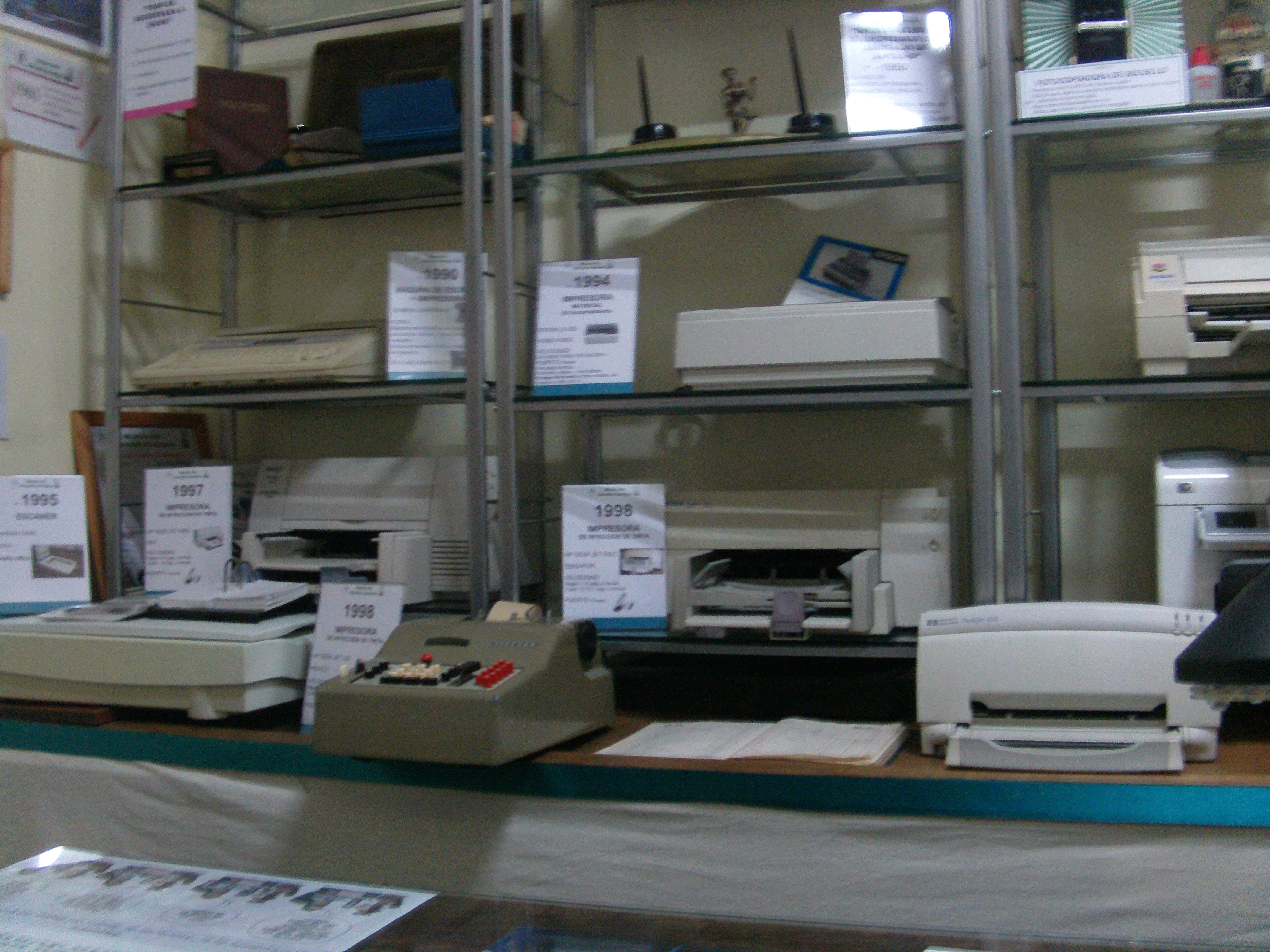 Se trata de una variedad de máquinas y elementos que se utilizaron en los Estudios Jurídicos de nuestro país.